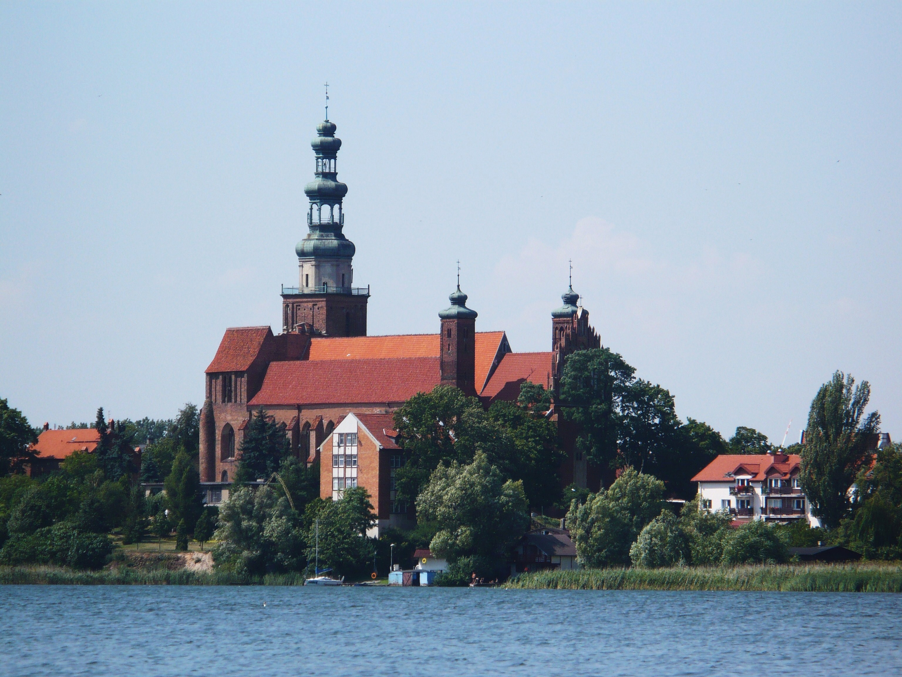 Chełmża, kościół katedralny pw. Św. Trójcy, 2 poł. XIII-XVII